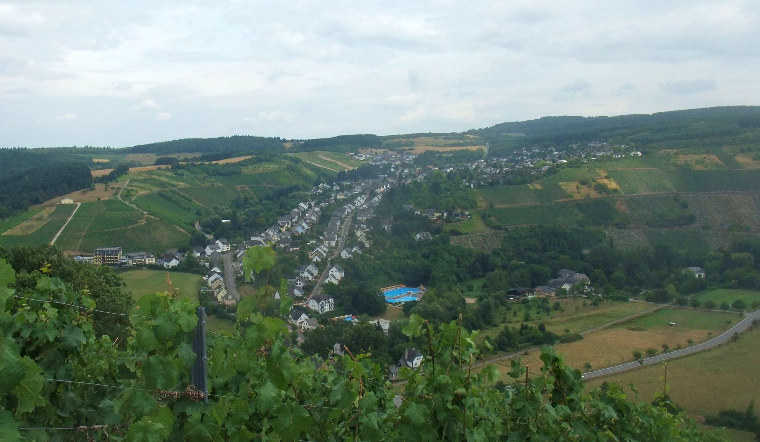 Mertesdorf